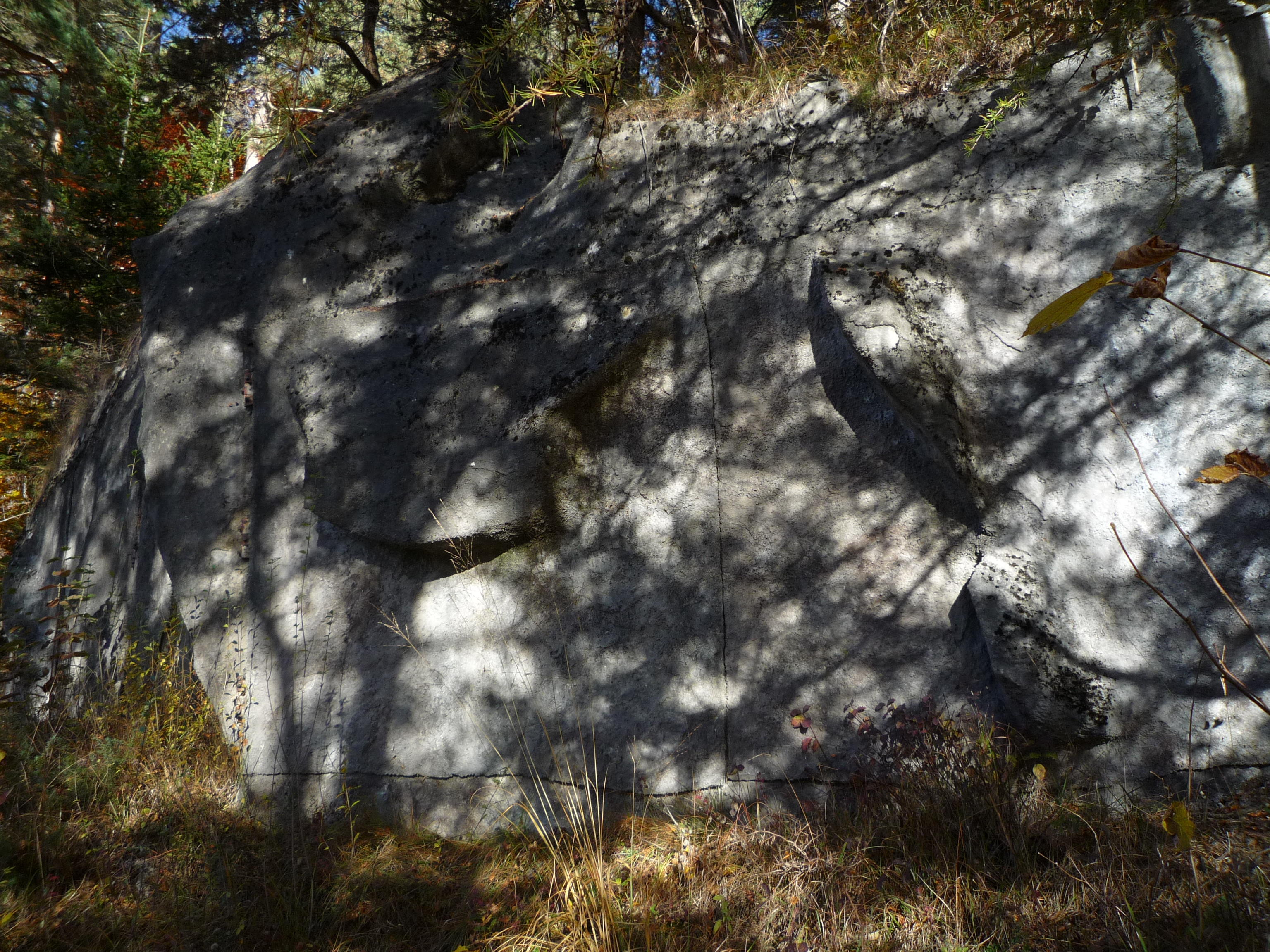 Infanteriebunker A 7770 «Laseaz Nord»